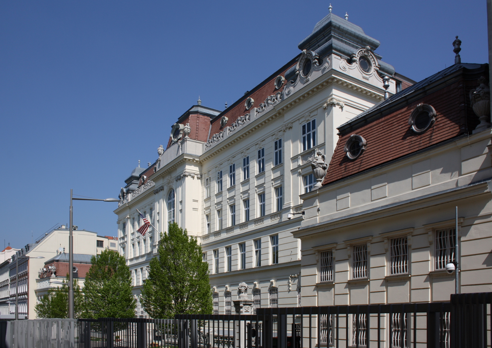 Die ehemalige Konsular-Akademie und jetzige US-Botschaft im 9. Wiener Gemeindebezirk Alsergrund. Das Gebäude wurde 1947 um 392.139 Dollar von der US-Regierung gekauft. Anfangs diente es als US-Gesandtschaft und ab 1951 mit Walter J. Donnelly als erster Botschafter der Vereinigten Staaten in Österreich.